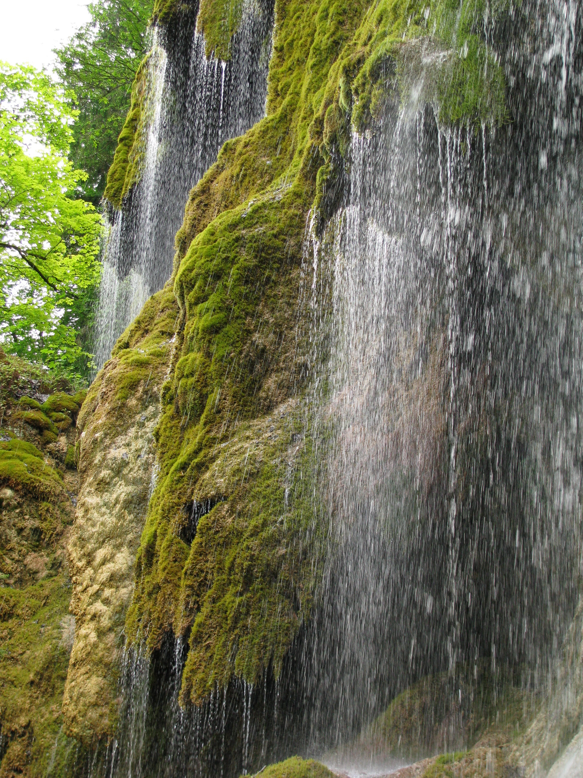 Schleierfälle an der Ammer